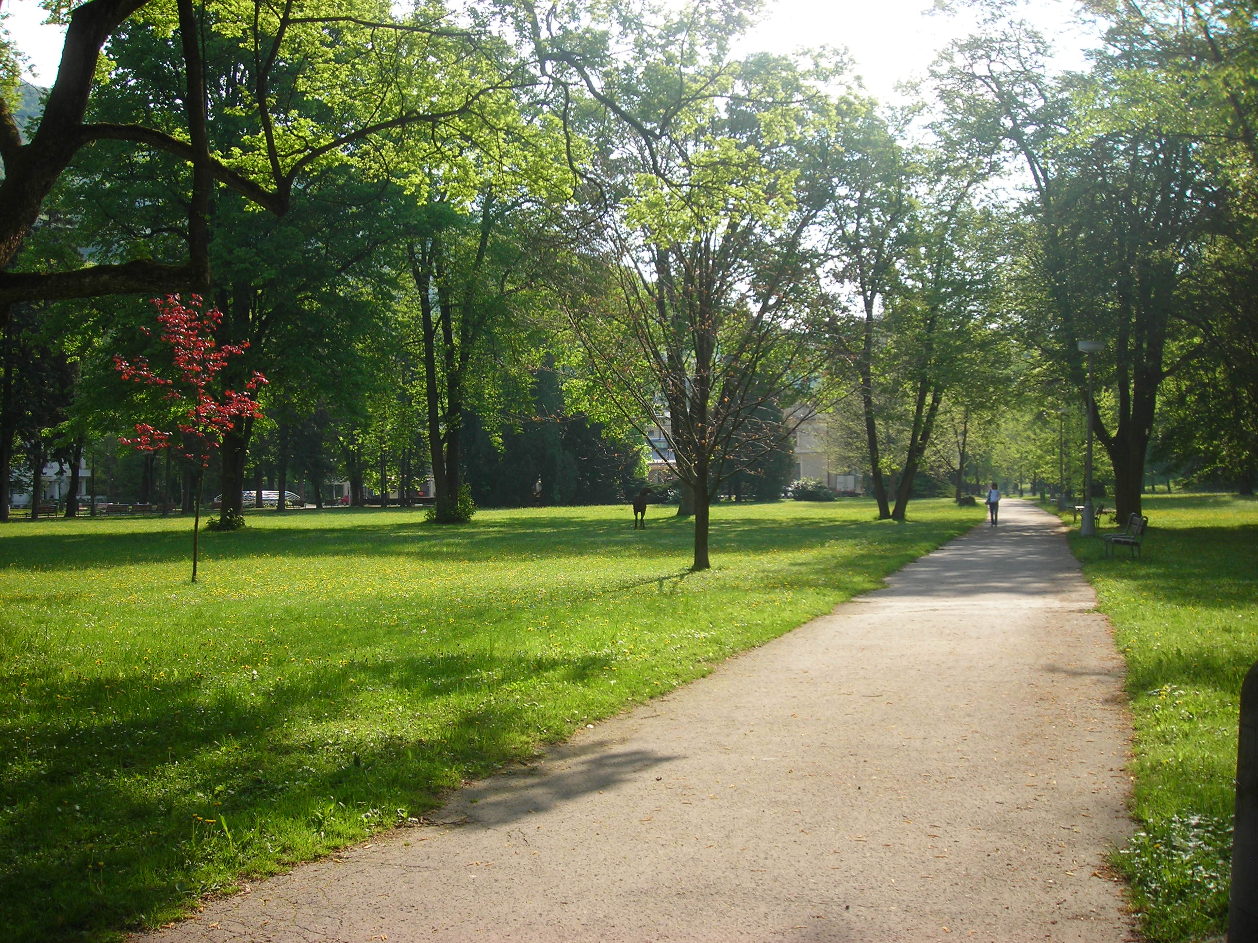 Kúpeľný park v Trenčianskych Tepliciach